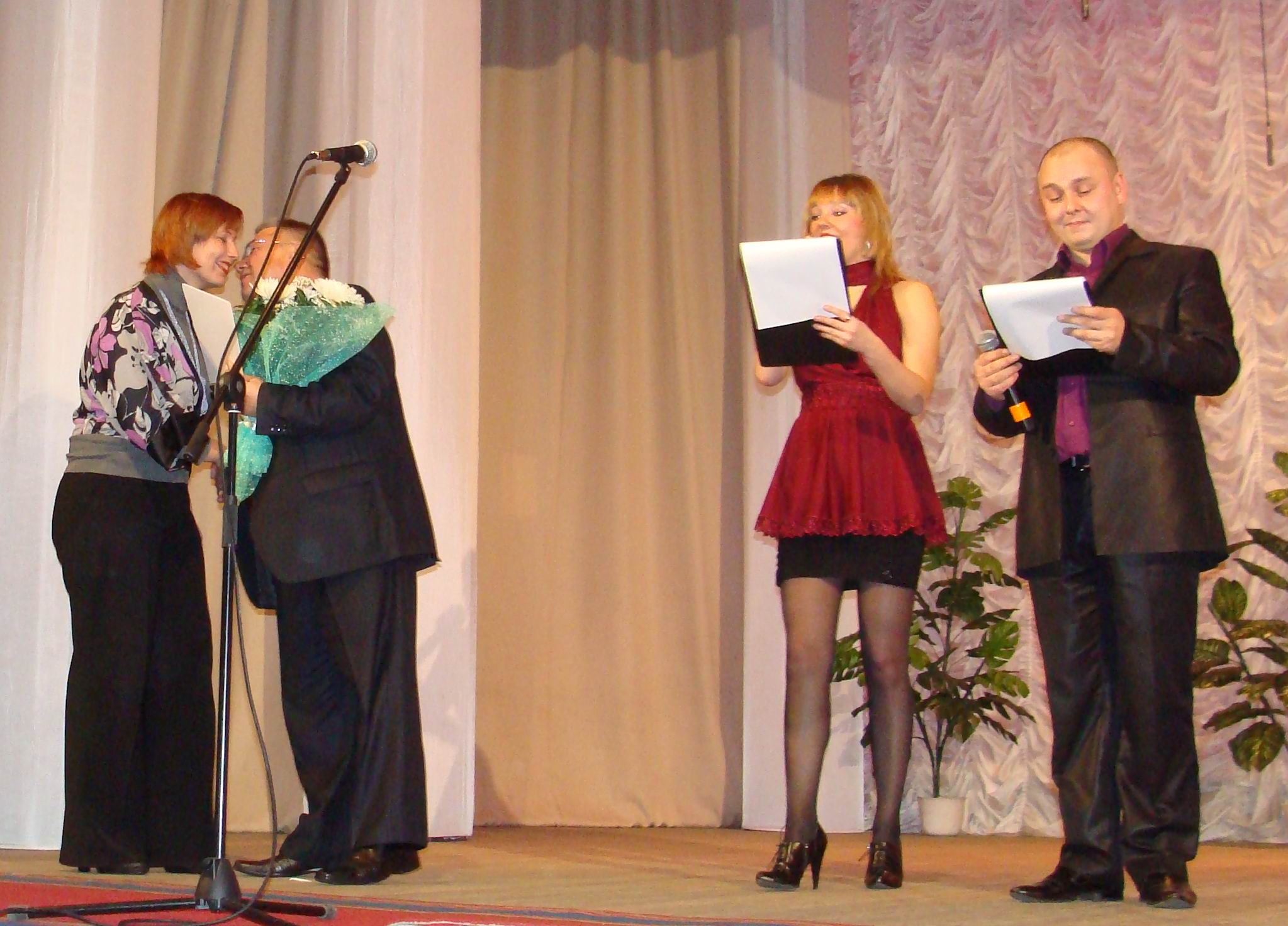 Праздничный концерт посвященный Дню Матери России (накануне праздничного воскресенья 28 ноября 2009 года)